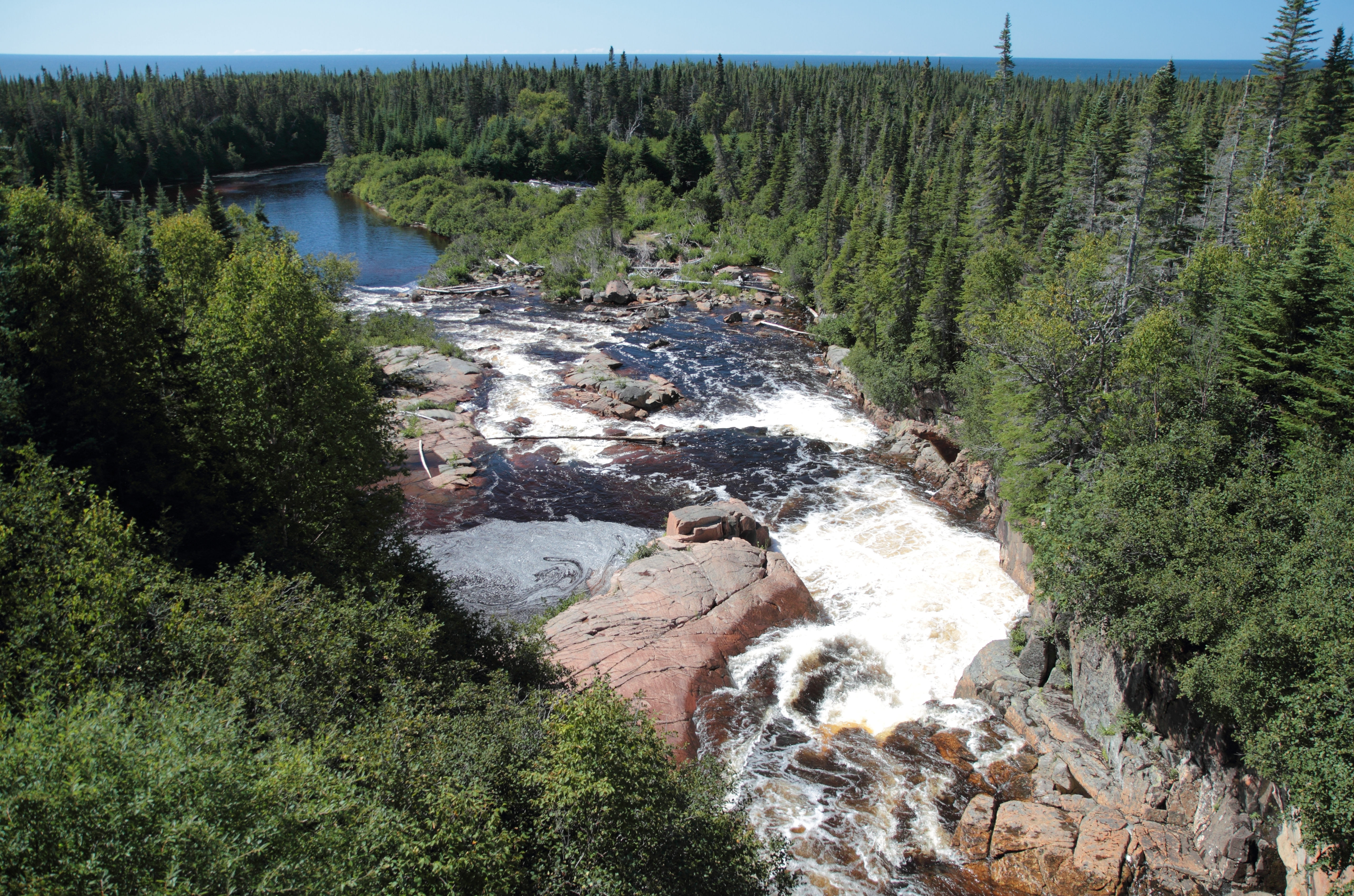 Rivière Jupitagon, Rivière-Saint-Jean, Québec, Canada